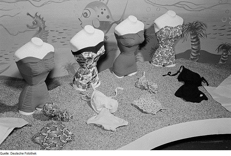 Original image description from the Deutsche Fotothek Badetextilien für Damen auf der Leipziger Herbstmesse 1954